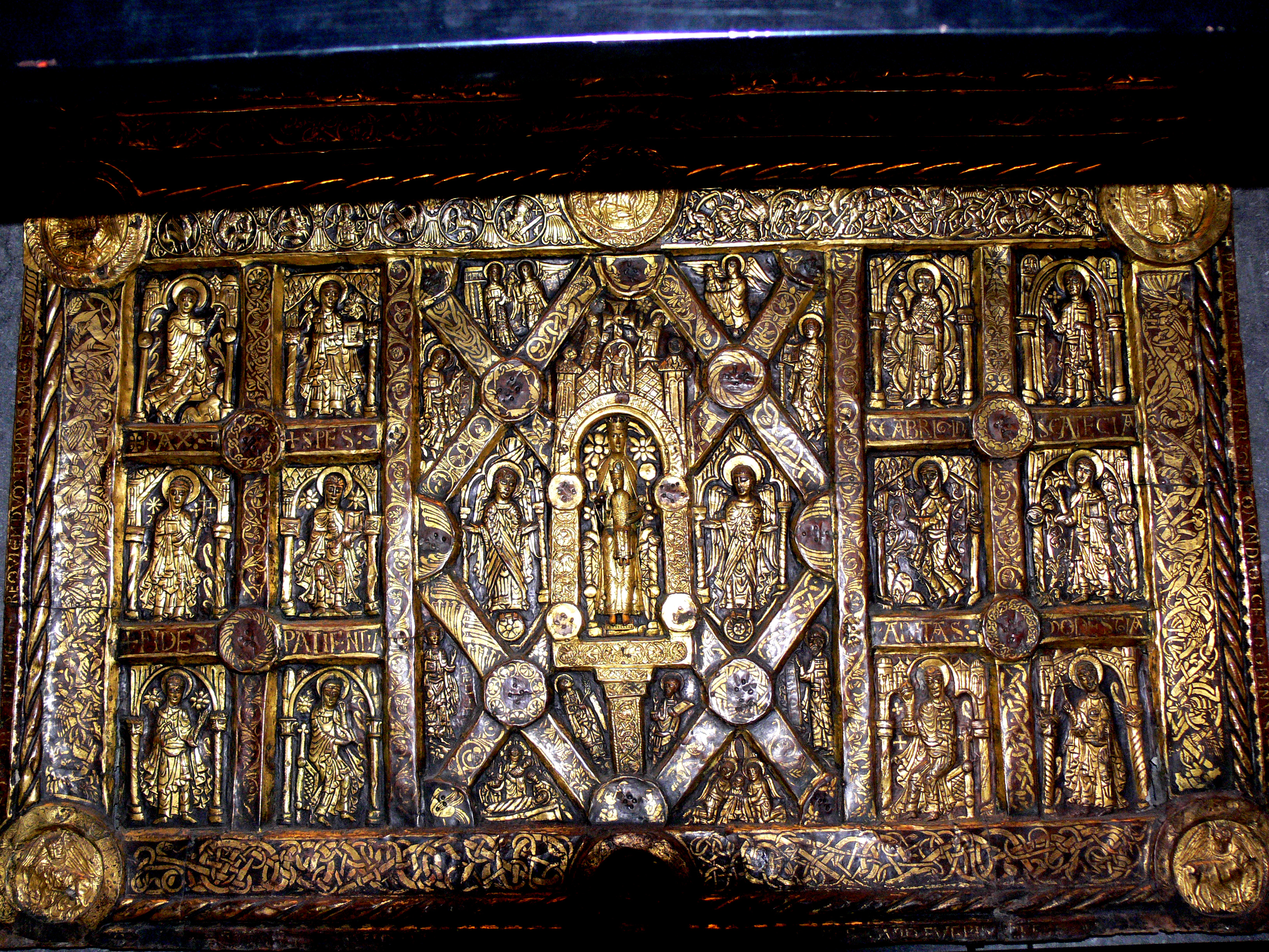 Lisbjerg_Altar, unterer Teil